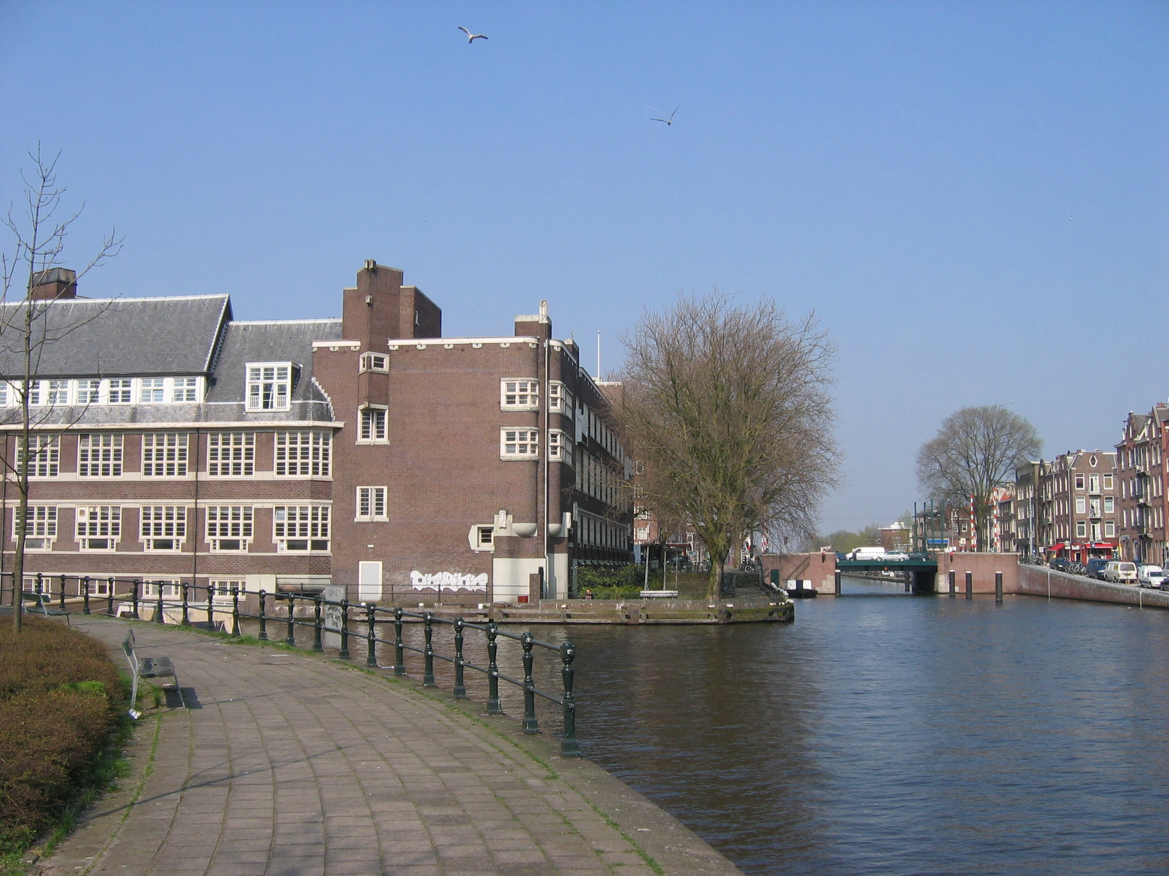 Kostverlorenvaart en Schinkel Amsterdam Situatie 1 april 2005 Fotoreportage i.v.m. de Dag van de Architectuur 2005